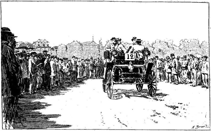 Hans Thum, sur Benz (pour l'écurie Émile Roger de Paris, de deux voitures, au Paris-Bordeaux-Paris 1895) - Le Véloce-sport du 20 juin 1895, p.445